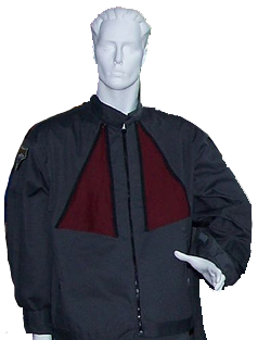 Reproduction d'un uniforme d'un membre de l'administration de l'expédition sur Atlantis.